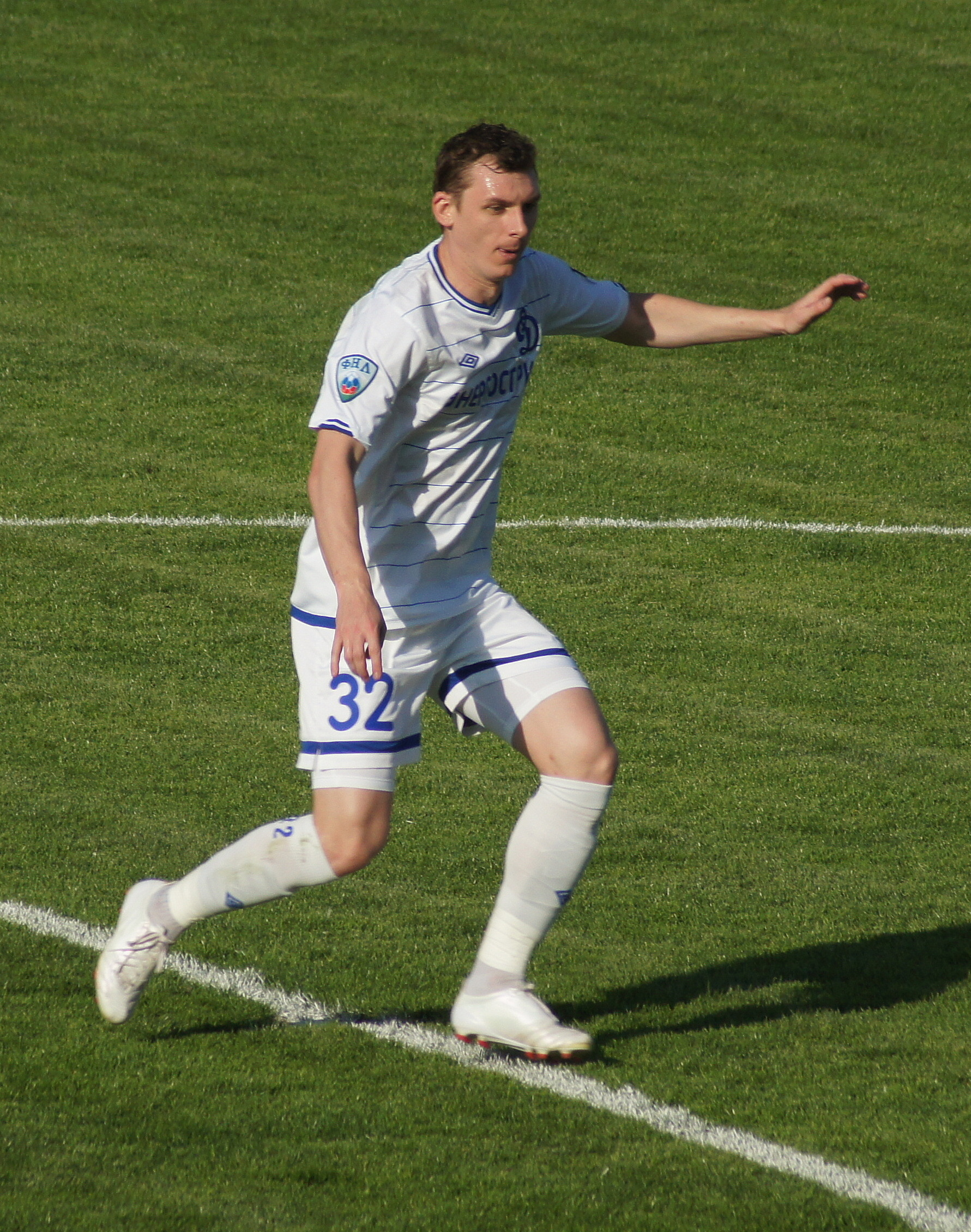 Дмитрий Голубов в Динамо (Брянск)